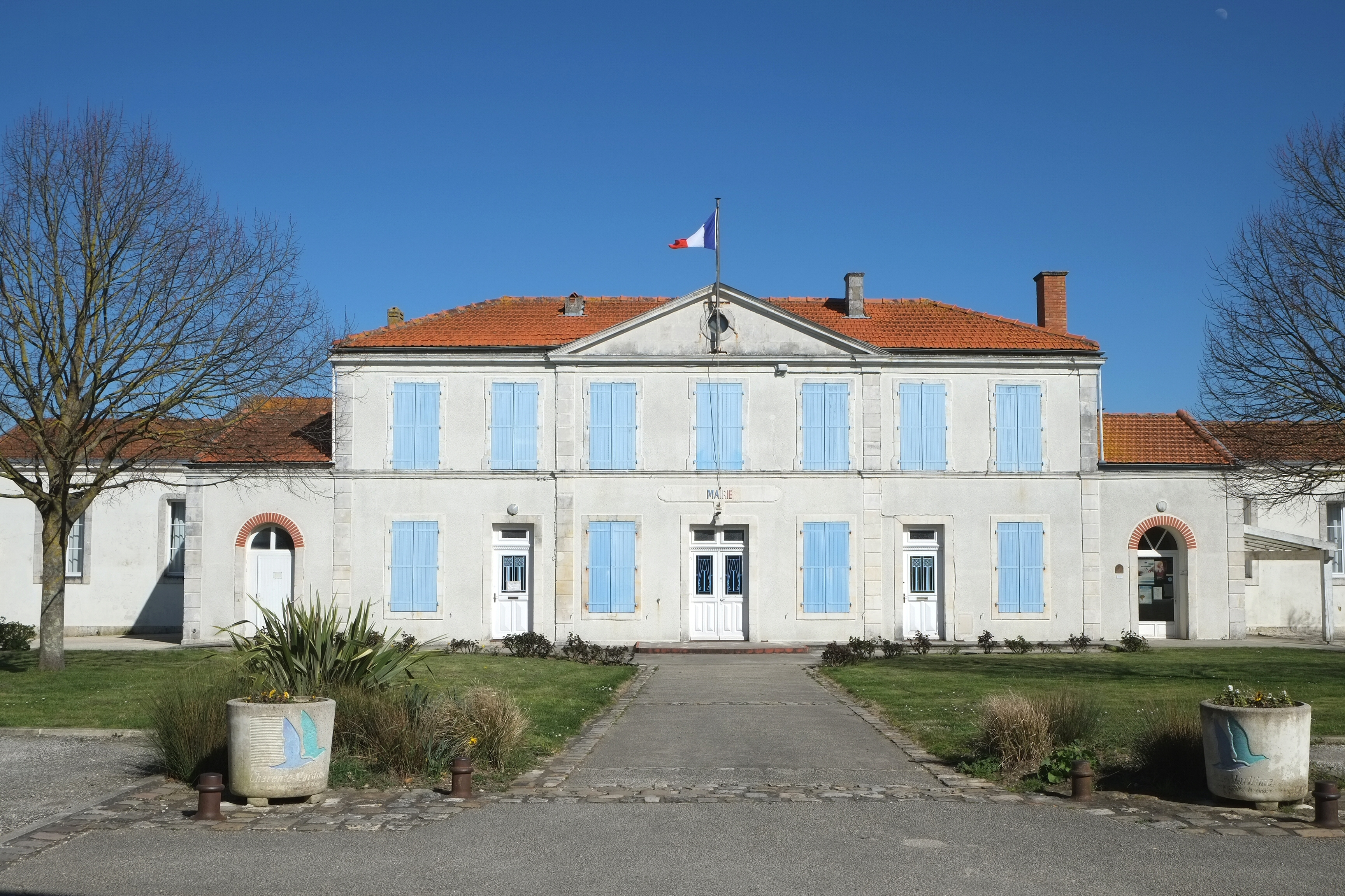 Mairie Breuil-Magné Charente Maritime France